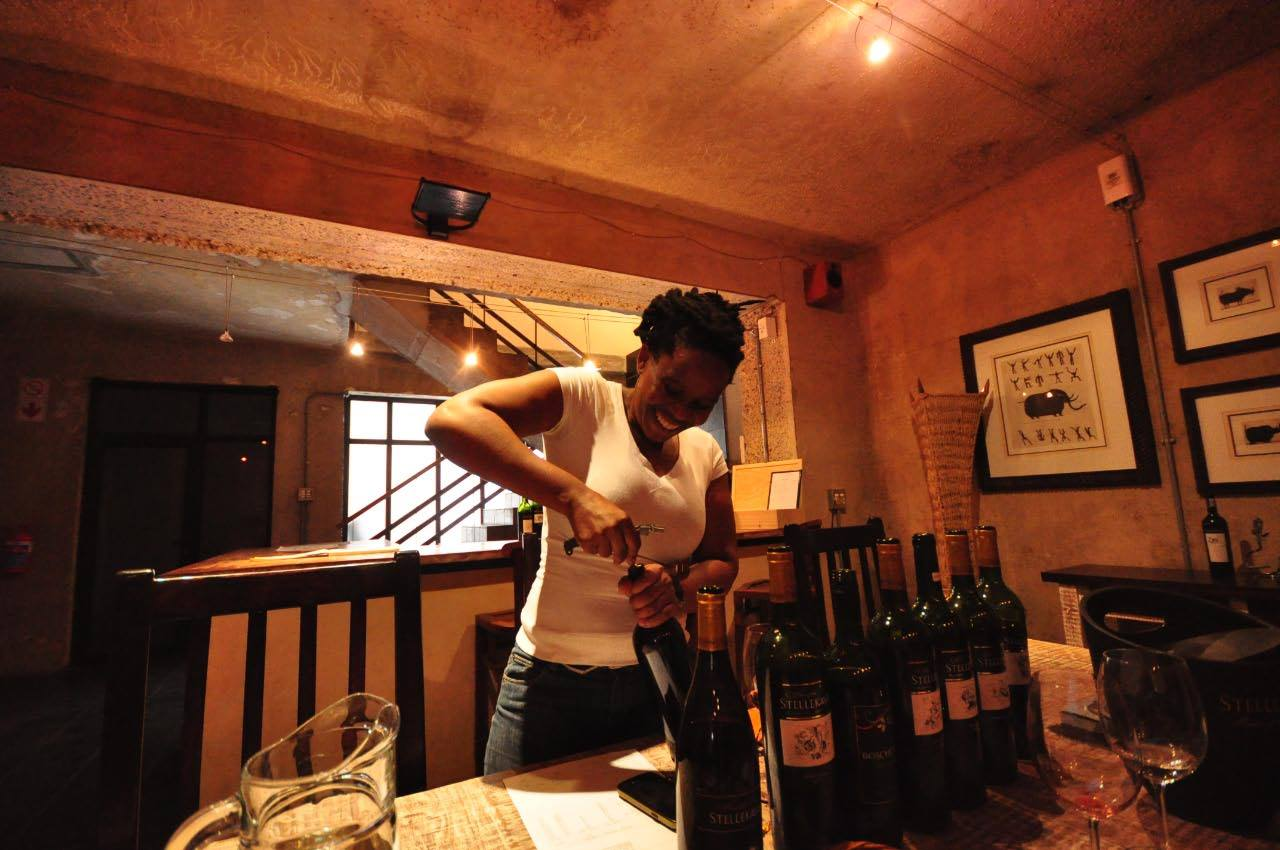 Ntsiki Biyela im Tasting Room von Stellekaya